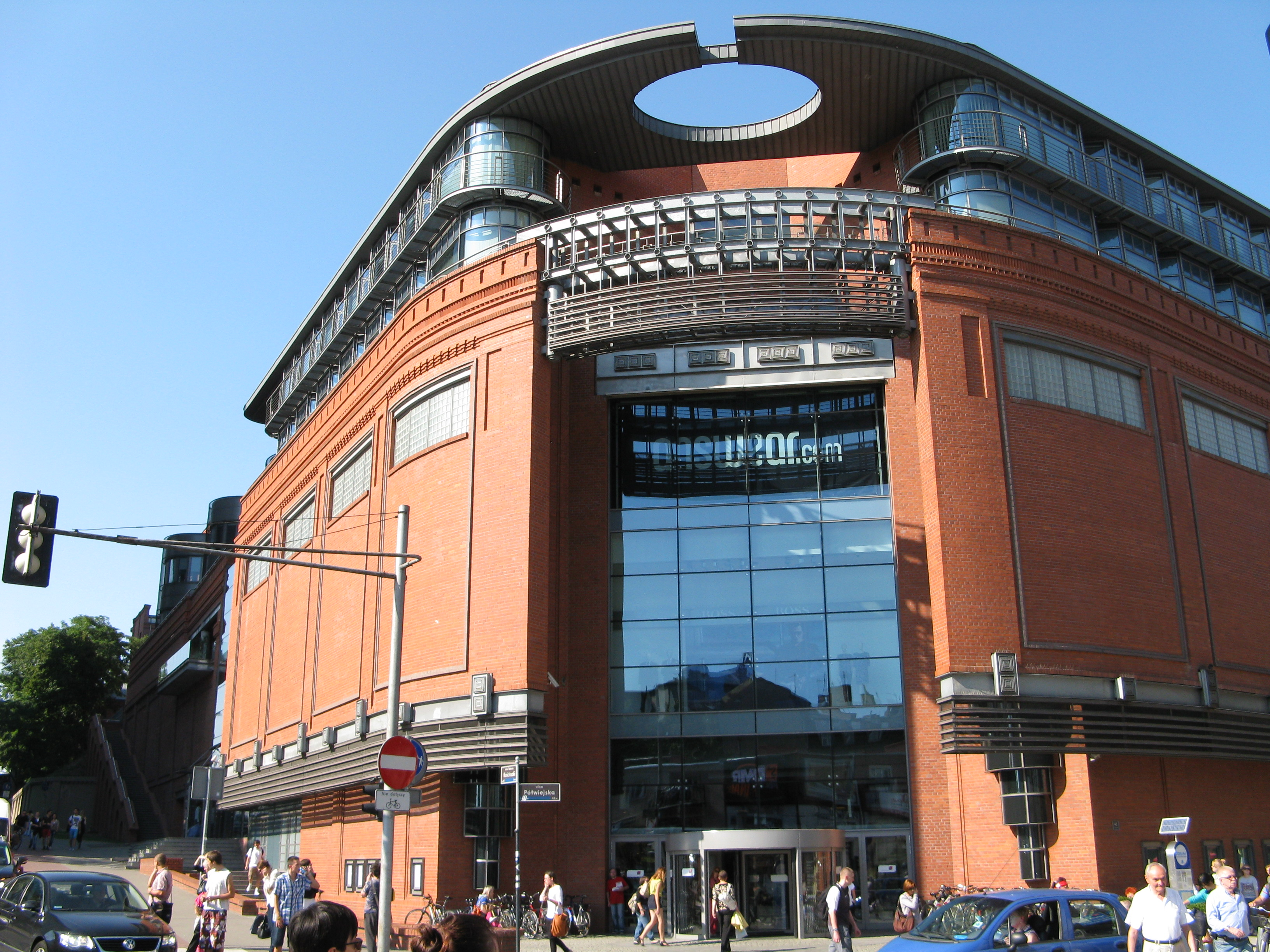 Poznań, ul. Półwiejska 42 / Kościuszki - Stary Browar, obecnie centrum handlowe (zabytek nr A 251)